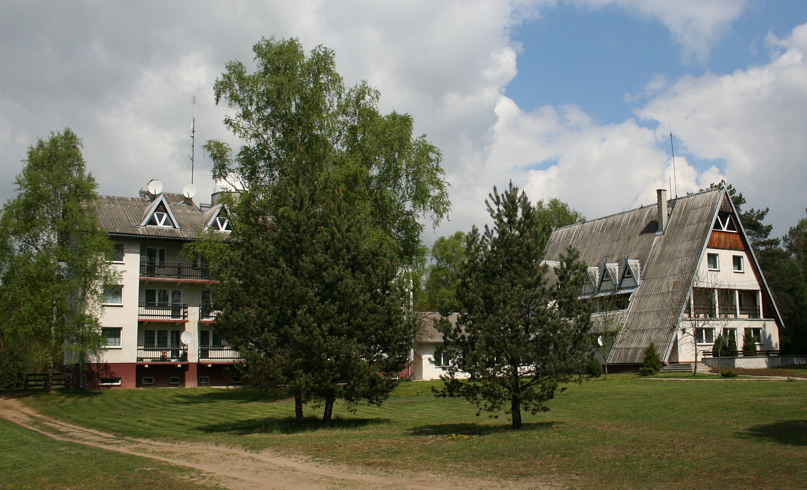 Ośrodek harcerski w Załęczu Wielkim